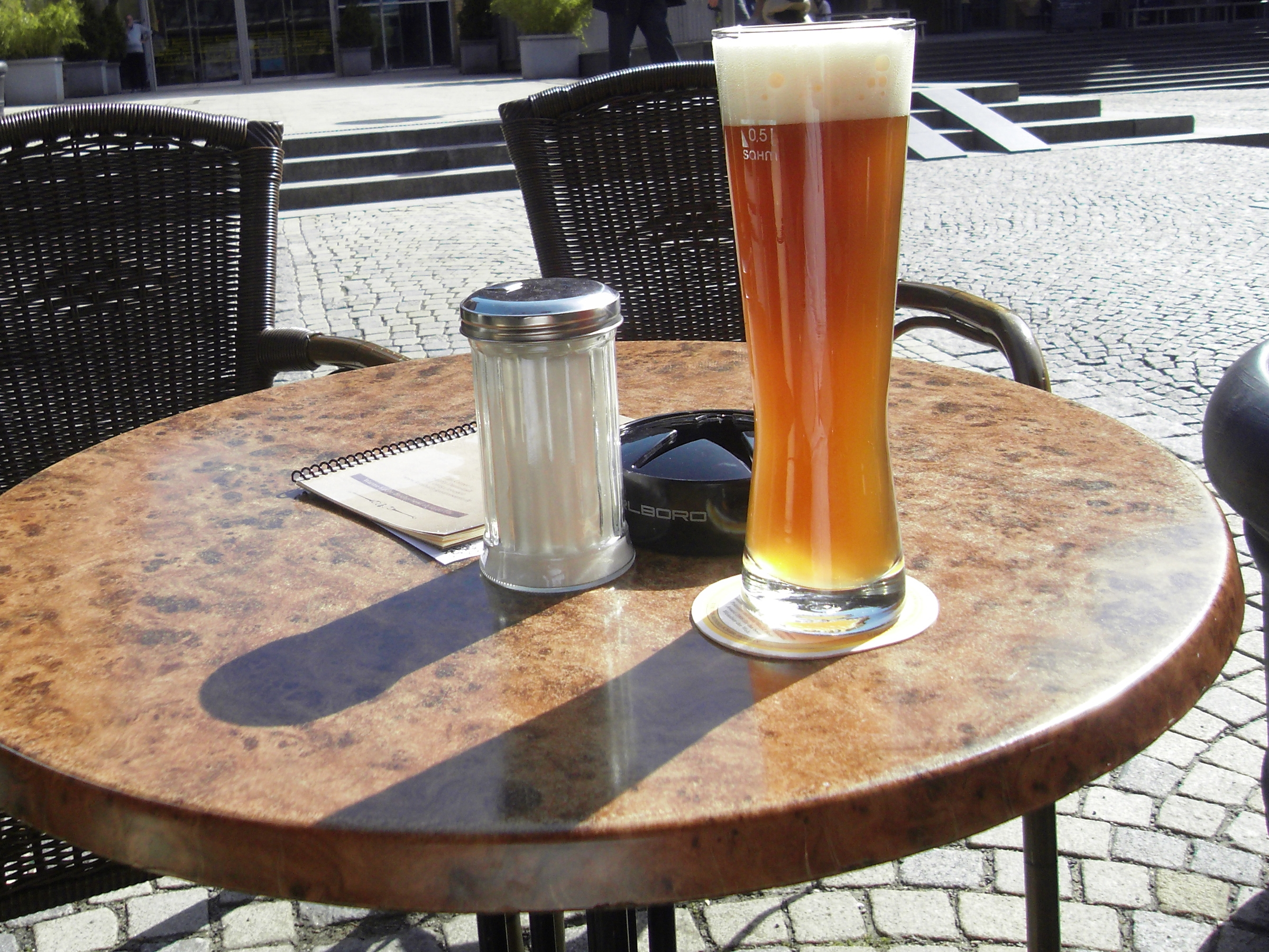 Weizenbier im Strassenkaffee